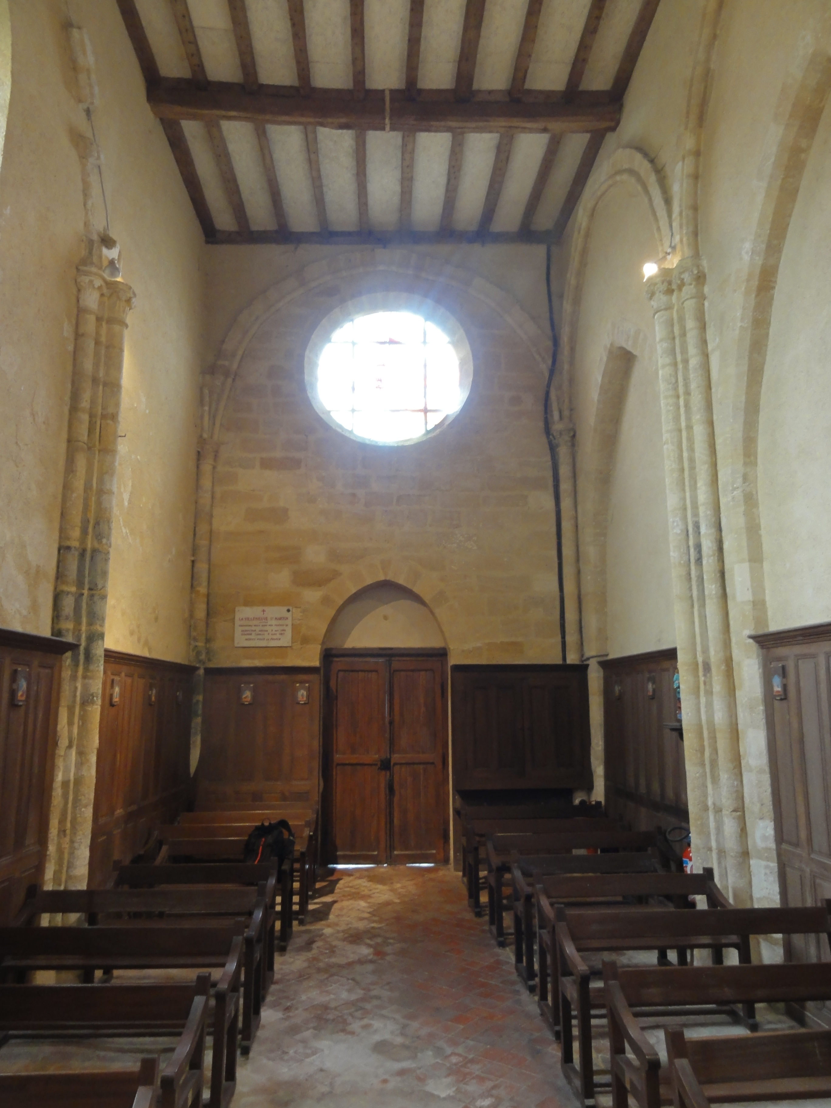 Intérieur de l'église - voir titre.